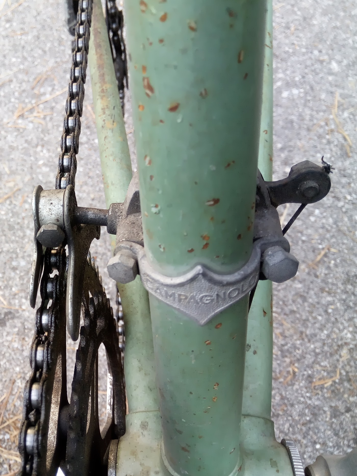 Deragliatore frontale a movimento lineare della Campagnolo, con comando dal basso